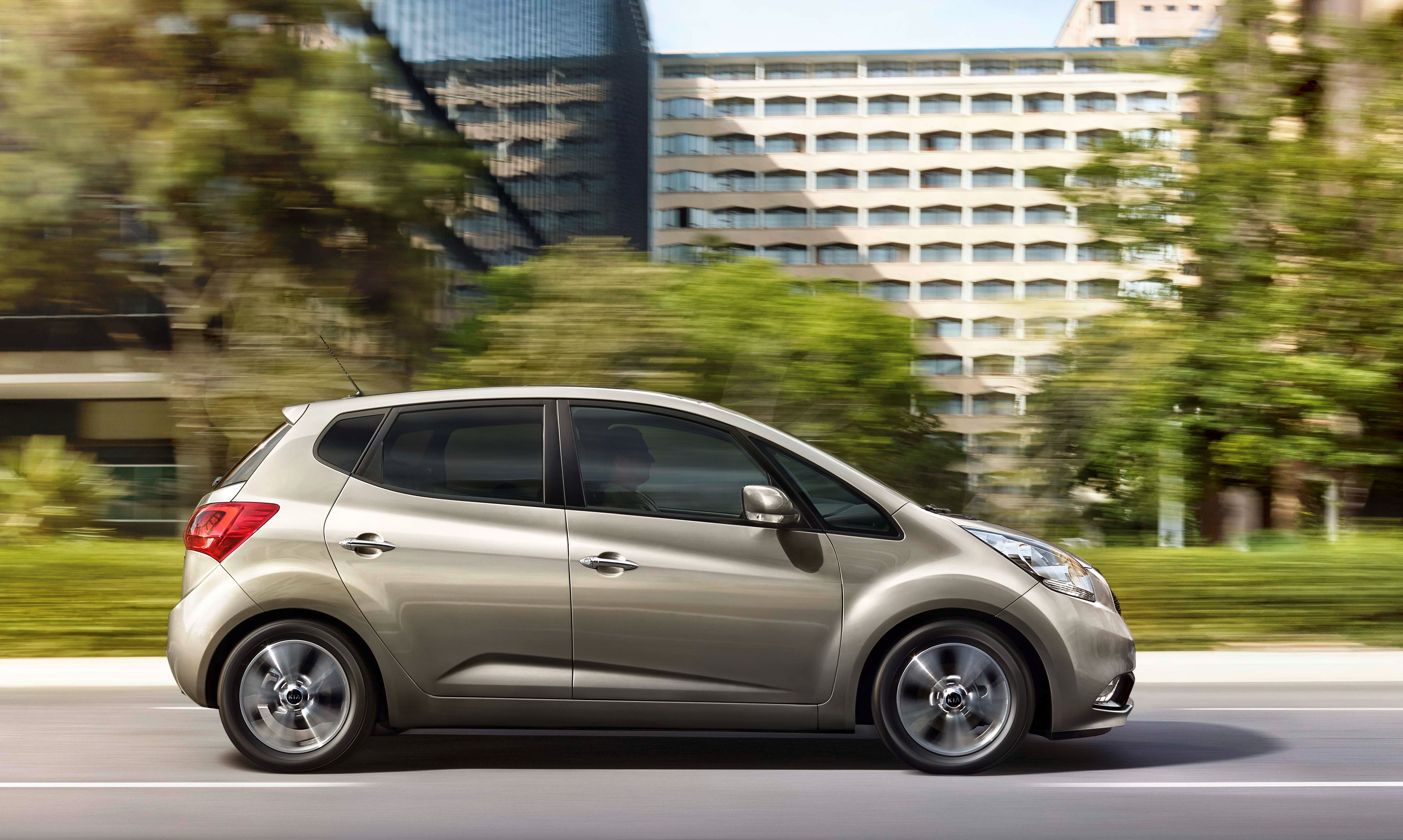 Kia Venga